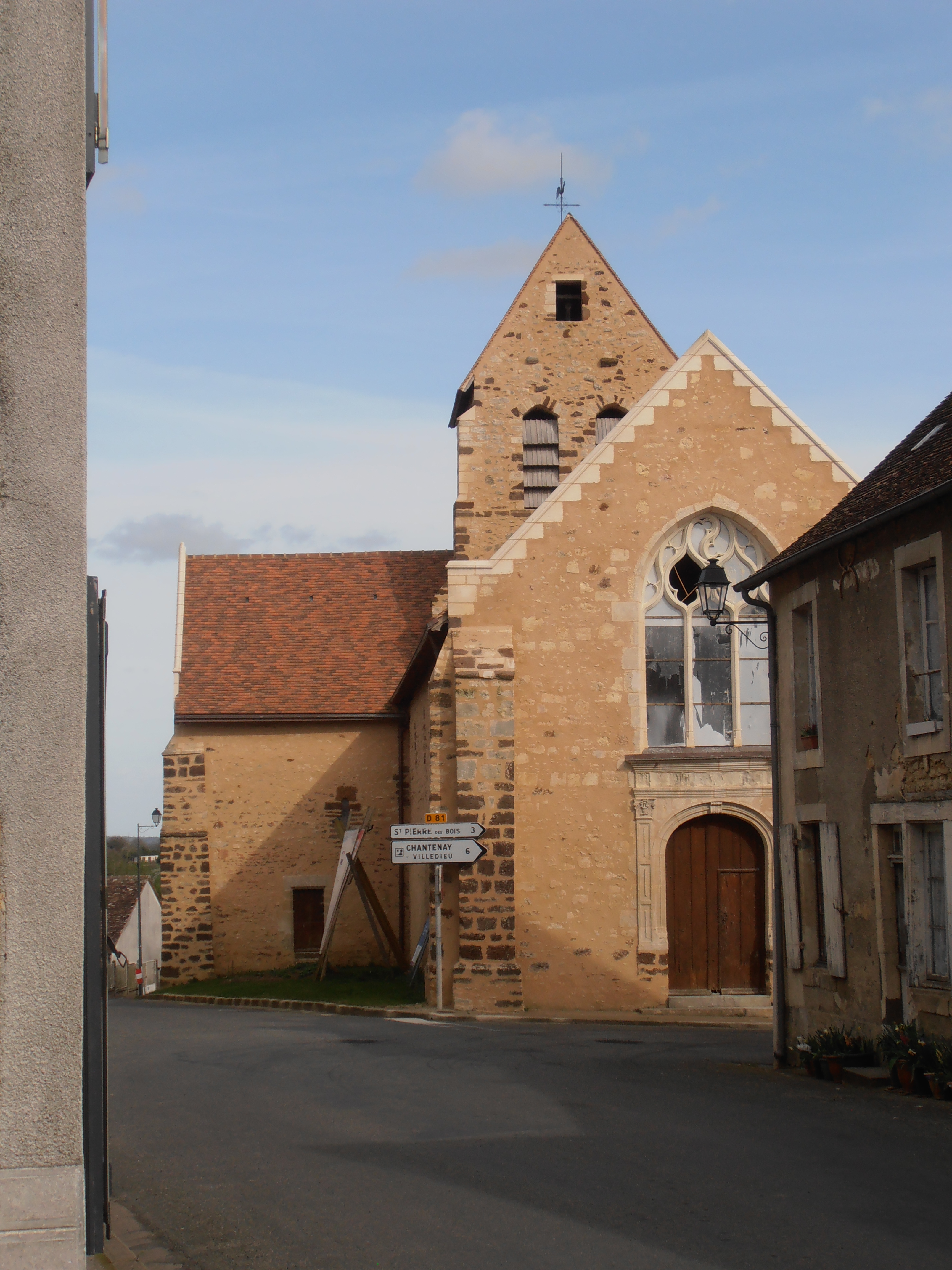 Vue d'ensemble de l'église